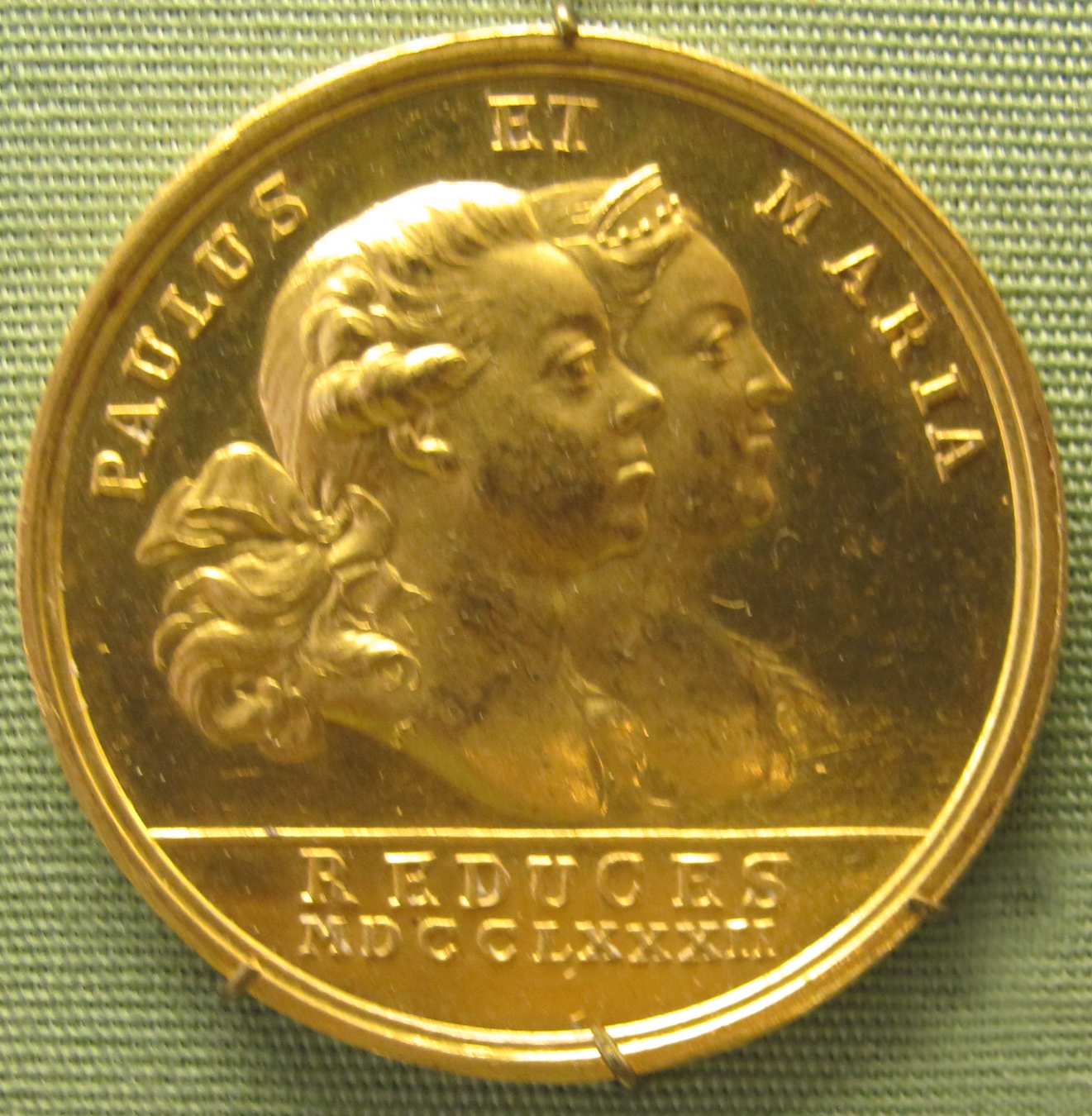 Abraham abramson, paolo I di russia e maria federowna, oro, 1783